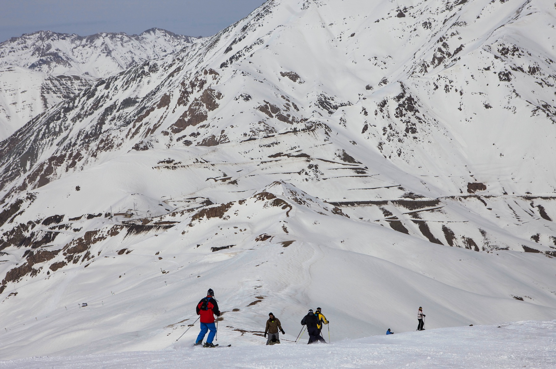 Dizin Ski resort, Alborz Mountains, Tehran Iran